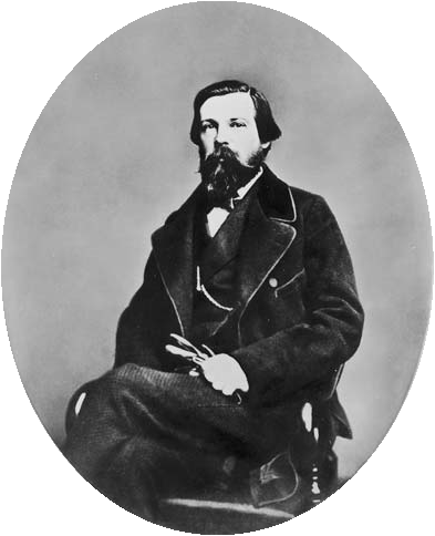 Friedrich Engels (1820–1895), 1864. – Foto: Historische Zentrum Wuppertal